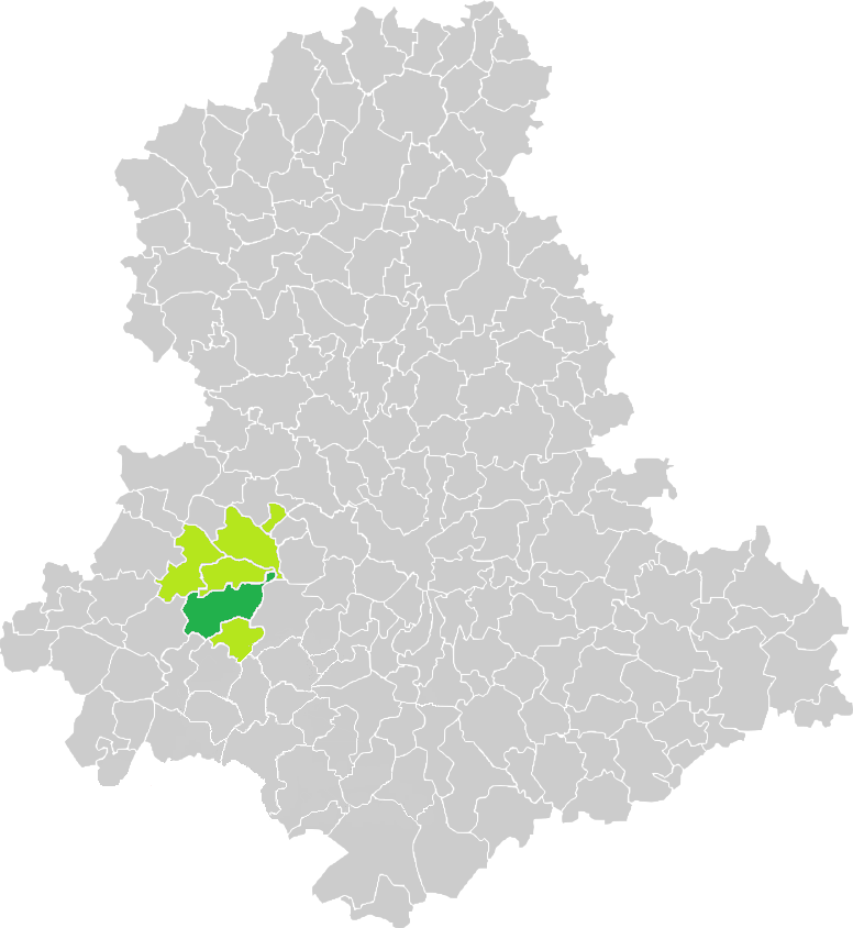 Carte de situation de la commune de Saint-Laurent-sur-Gorre (en vert foncé) dans le votre Canton (en vert clair) sur une carte des communes de la Haute-Vienne